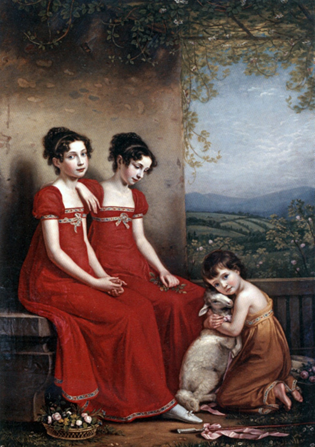 Das Bild zeigt drei der Töchter von Karoline von Baden und dem ersten König von Bayern Maximilian I. Joseph. Auf der Bank sitzend die Zwillinge Elisabeth und Amalie, vor ihnen kniened und ein Lamm umarmend die 1821 verstorbene Maximiliane.